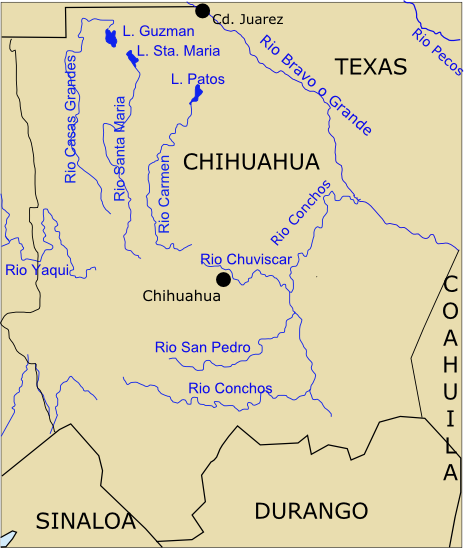 Hidrografia Primitiva de Chihuahua